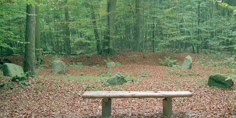 Aussenkreis des Boitiner Steintanzes.